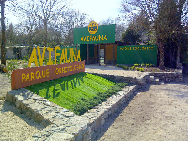 Avifauna Parque Ornitológico de Lugo